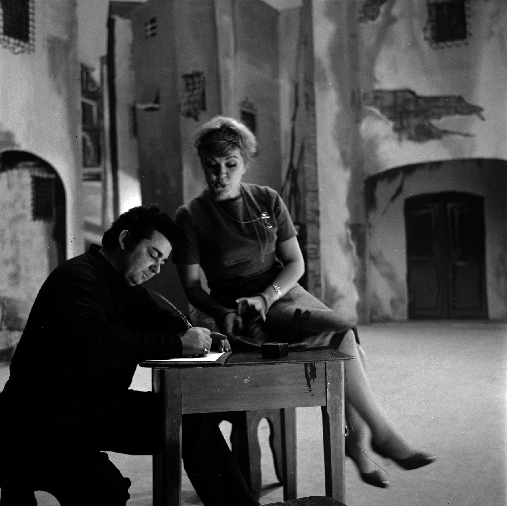 Théâtre du Capitole. Le 17 Octobre 1962. Vue de Jeanne Rhode et d'Albert Lance sur scène, jouant Carmen de Georges Bizet, mis en scène par Raymond Roulrau.